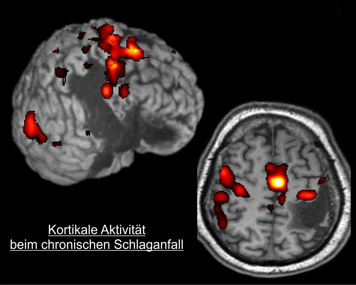 Kortikale Aktivität beim chronischen Schlaganfall